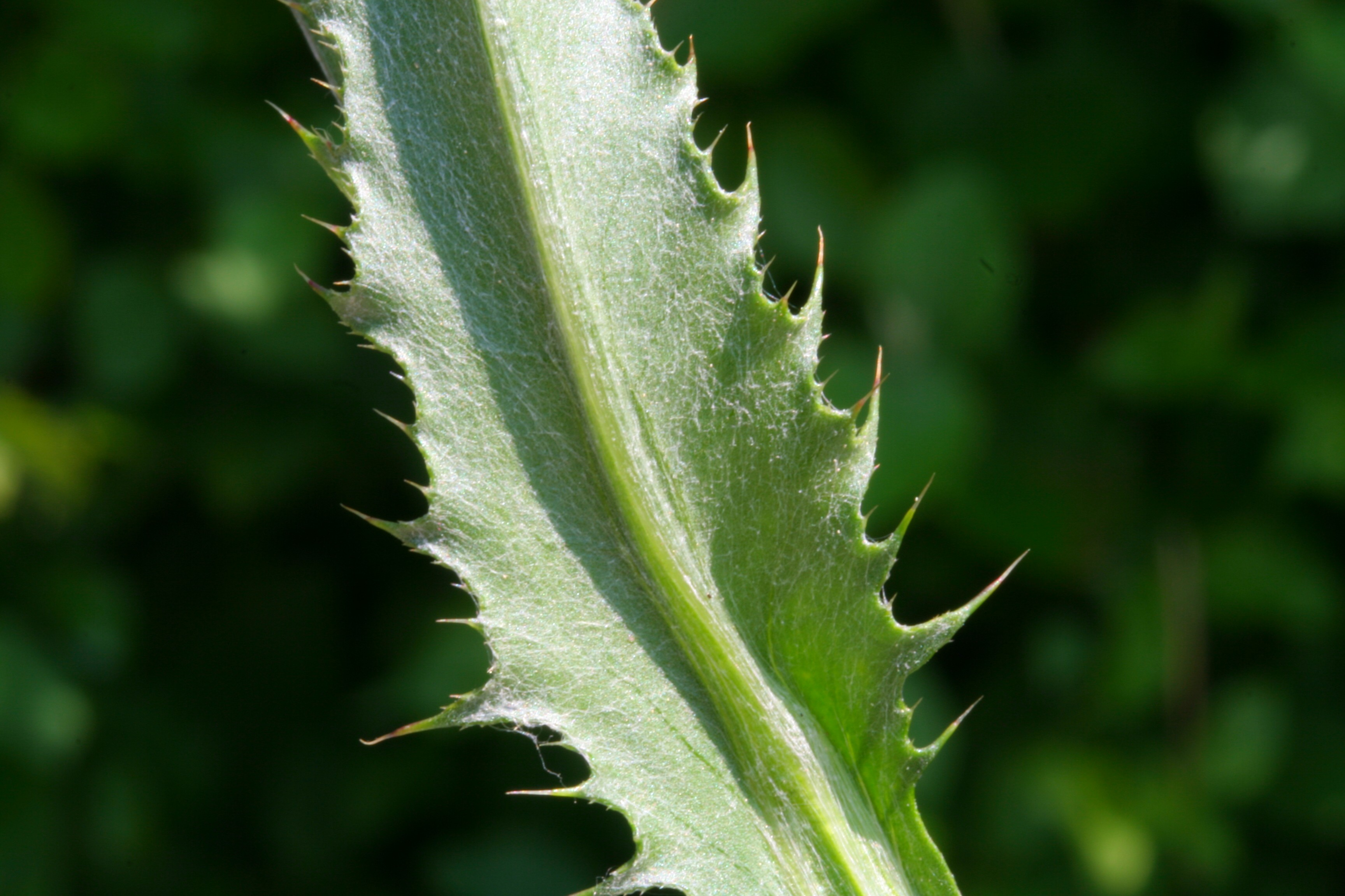 Cirsium pannonicum Località Villa Prima, Limana (BL), 350 m s.l.m.